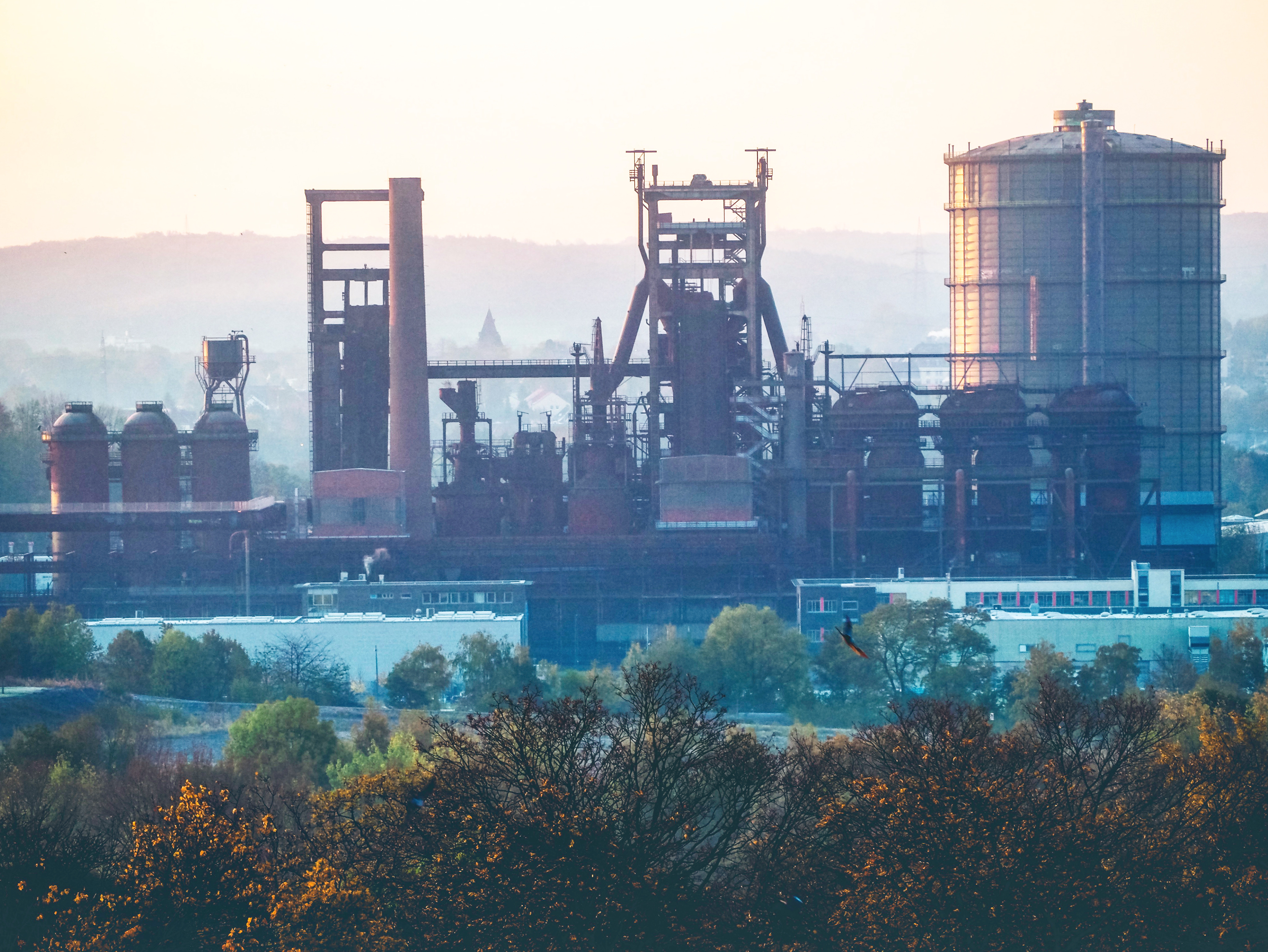 Phoenix-West Hochofenanlage